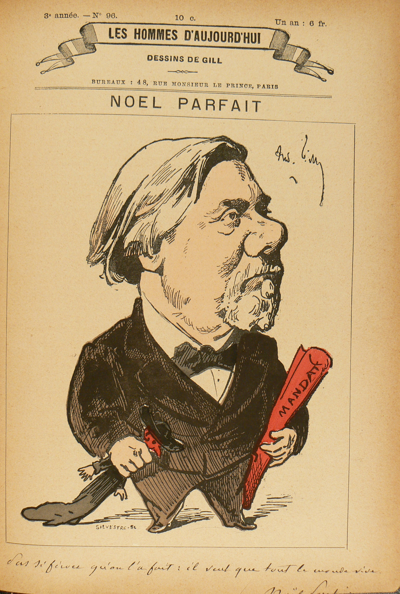 Caricature de Noël Parfait, Les Hommes d'Aujourd'hui, 3° année n°96. Vers 1881. "Pas si féroce qu'on l'a fait : il veut que tout le monde vive"